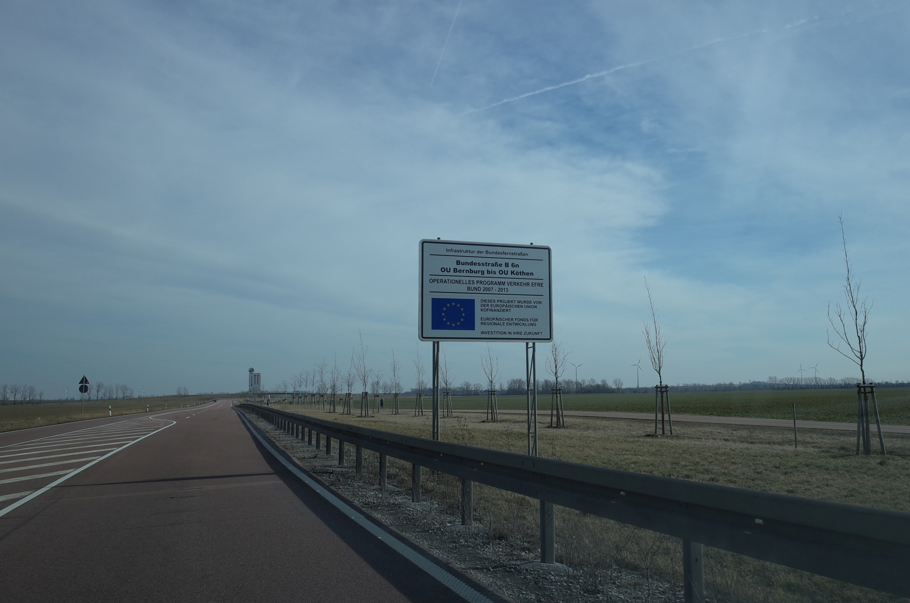 Informationstafel an der Bundesstraße 6n bei Bernburg (Saale) in Richtung Köthen (Anhalt). Die Straße ist Ausgeschildert als B 185.